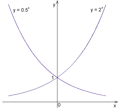 Příklady eponenciální křivky.